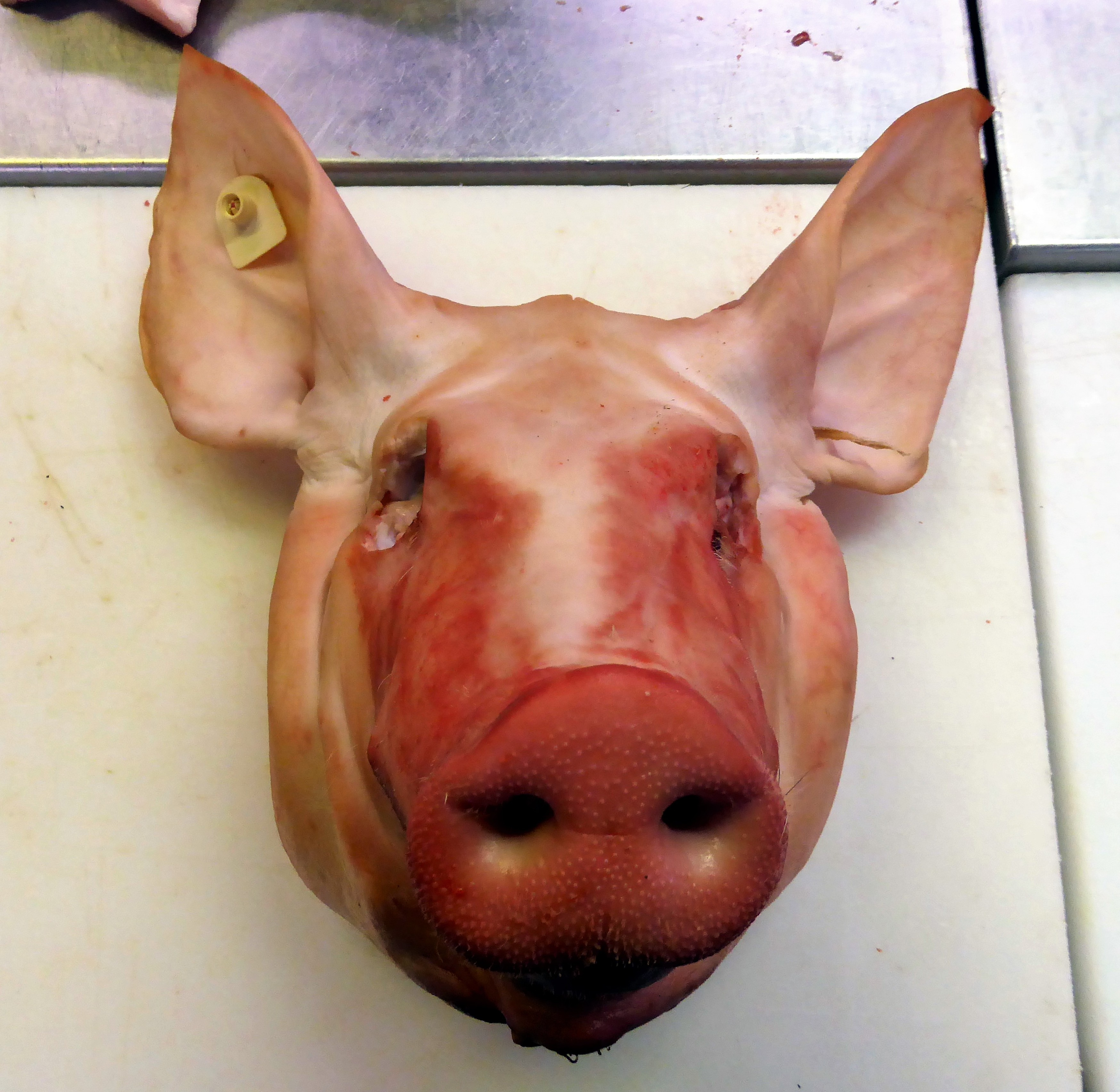 Wiki Loves Mett:Schweinekopf, Frontalansicht